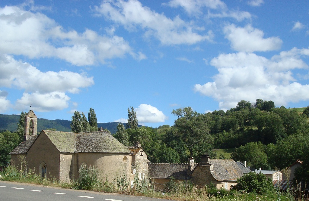 le village de Brenoux en Lozère